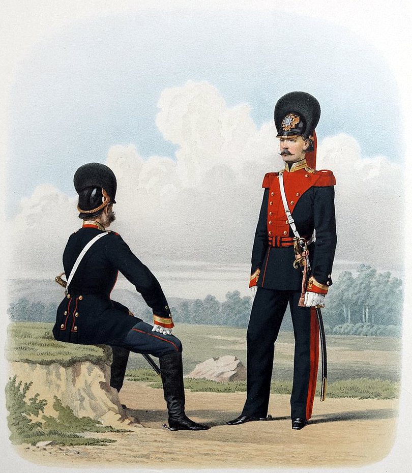 Л.Гв. Конно-Гренадерский полк. Фельдфебель (походная) и Унтер-Офицер (парадная формы.) 7 Января 1876.